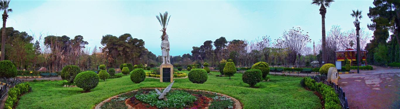 الحديقة العامة بحلب